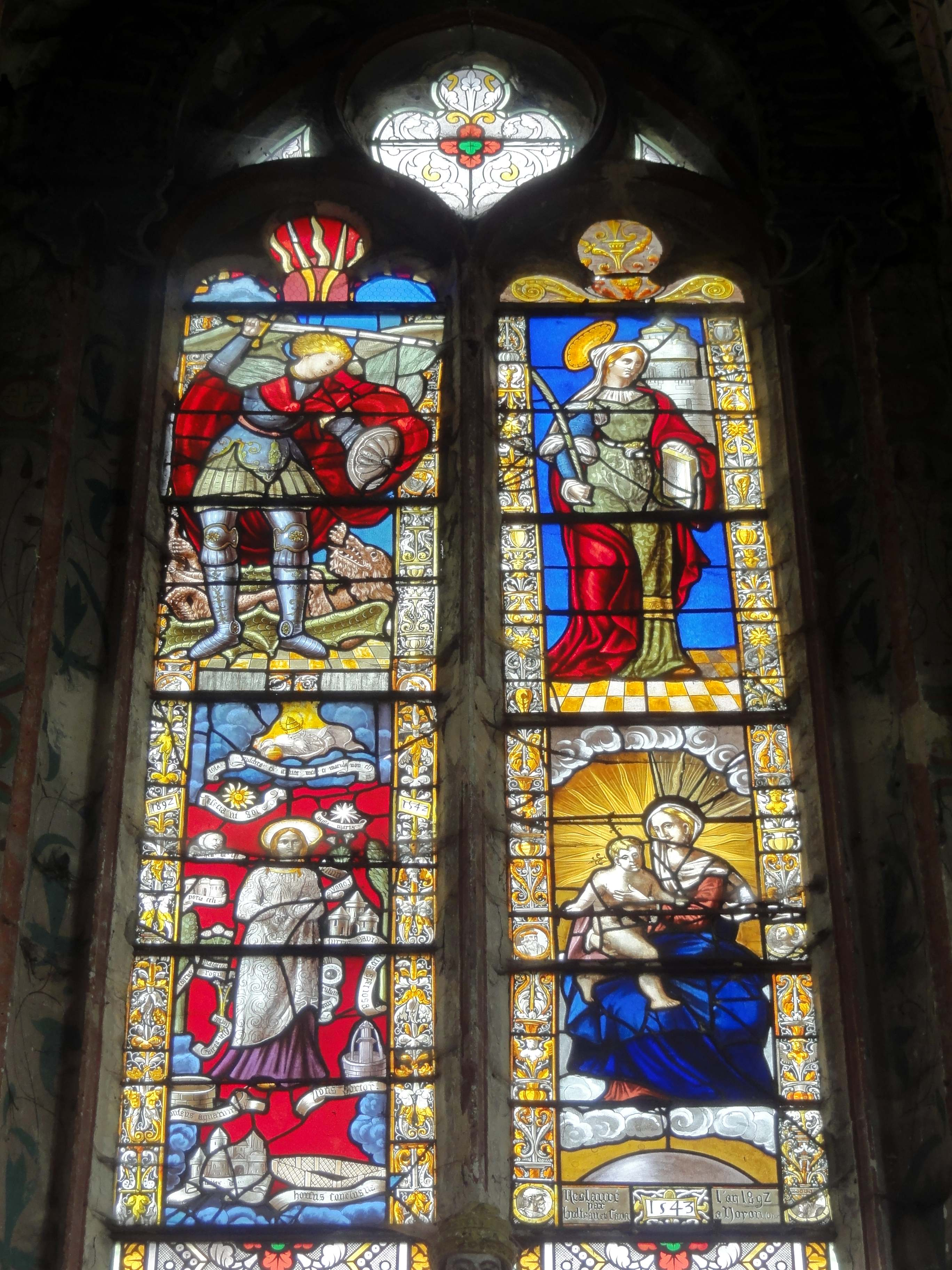 Vitraux Renaissance de l'église (voir titre).